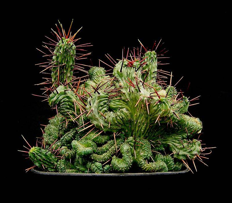 Euphorbia enopla fa. cristata